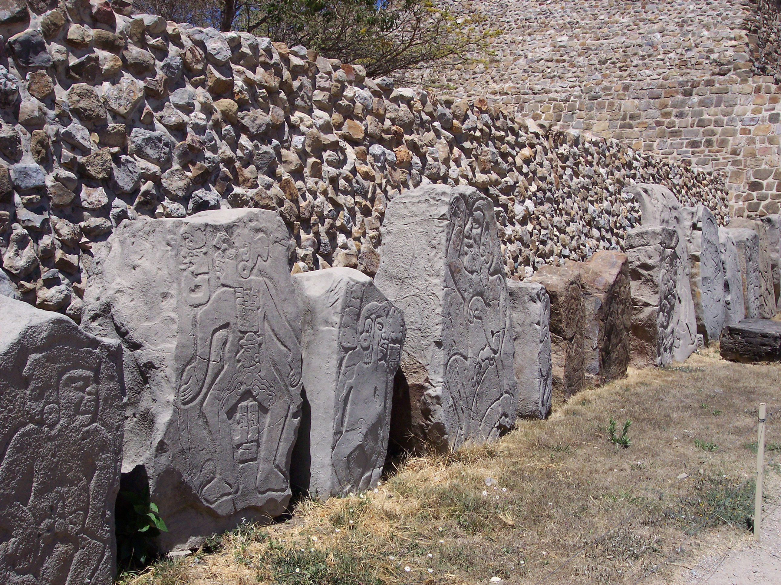 Photo taken in the Dancers Yard. Spanish. Foto tomada en "El patio de los danzantes". Photo taken in Monte Alban, State of Oaxaca, Mexico. NOTE: Photo nead to be describe. SPANISH: Foto tomada en Monte Albán, Estado de Oaxaca, México.